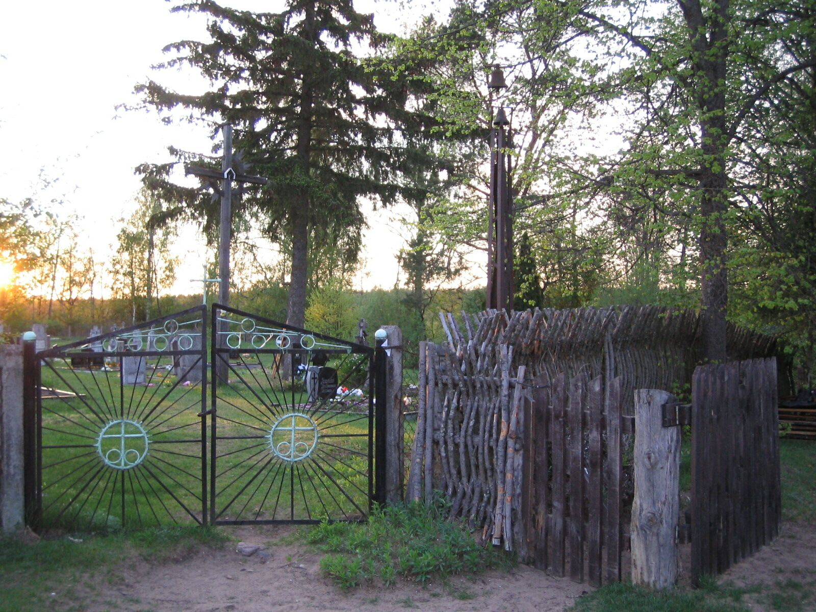 Kapinių vartai.